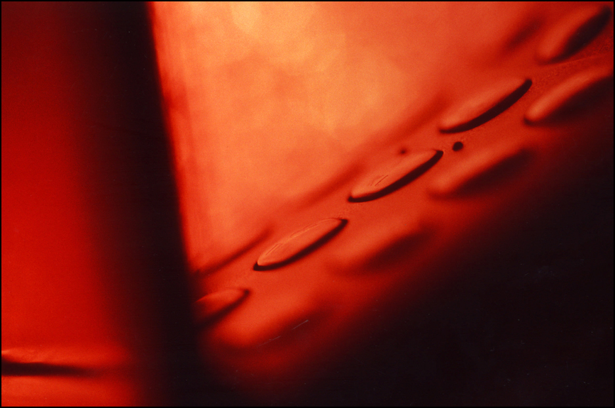 Mobile phone - Mobiele telefoon